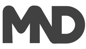 Srpskohrvatski / српскохрватски: MND Media Group Logo